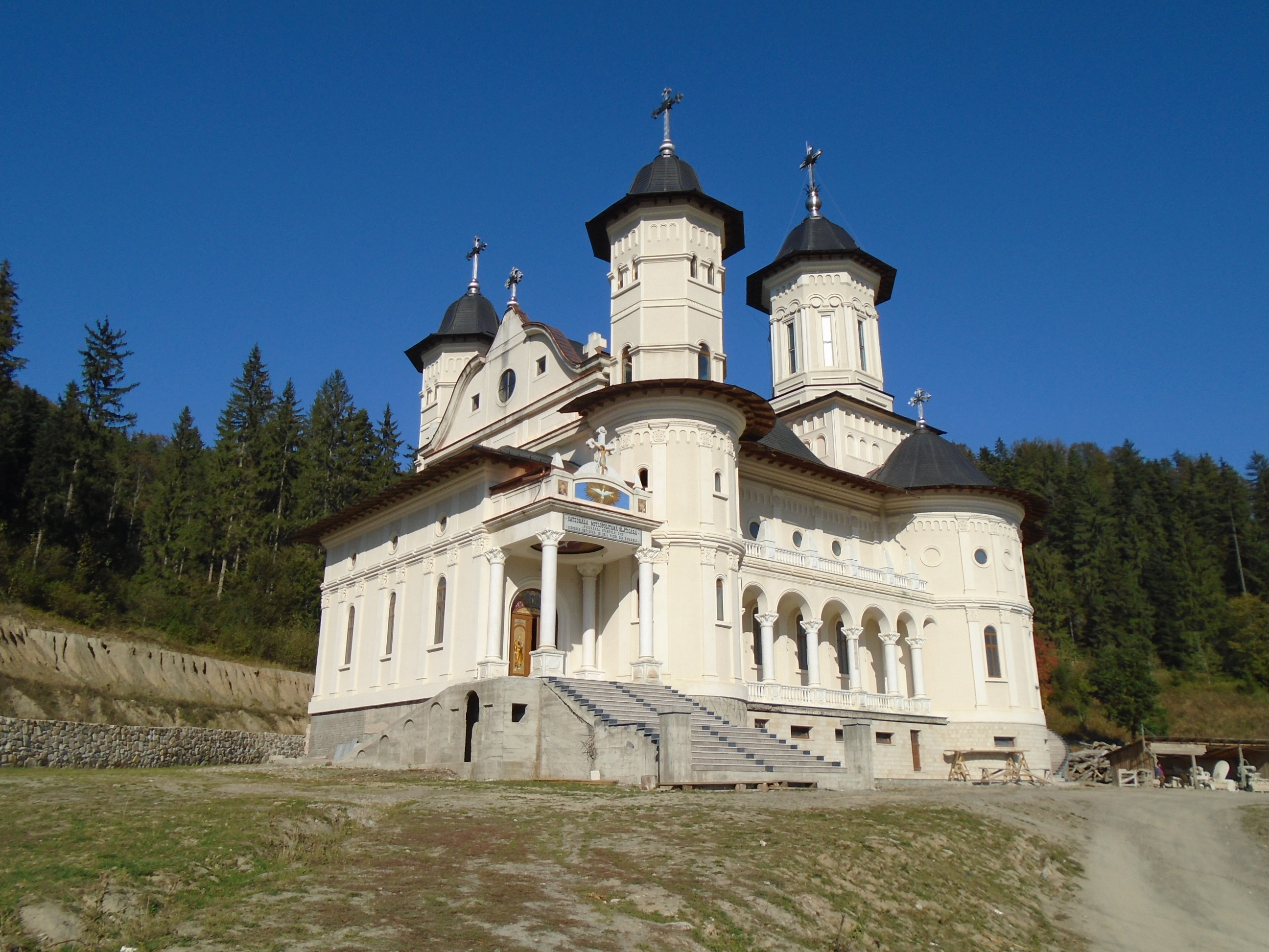 mitropolia bisericii ortodoxe pe stil vechi, Slătioara